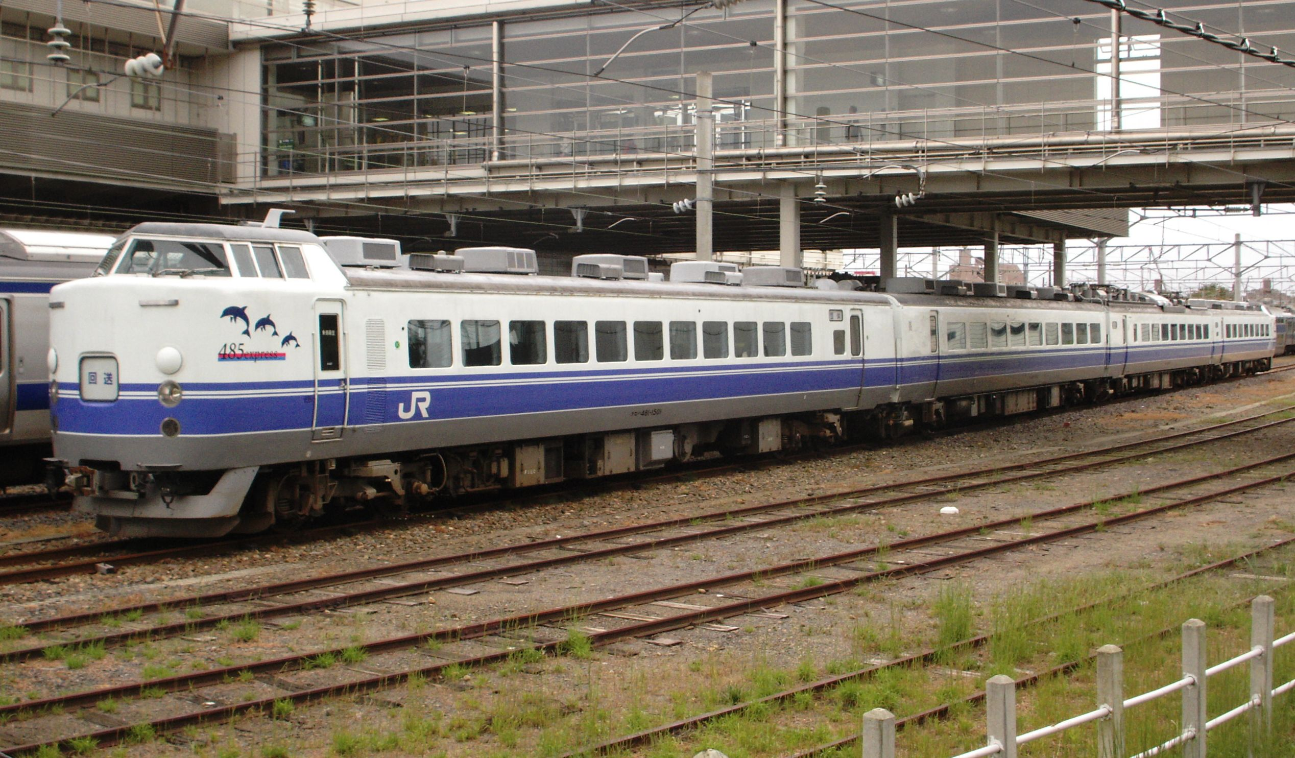 JR東日本485系K40編成（勝田駅にて）